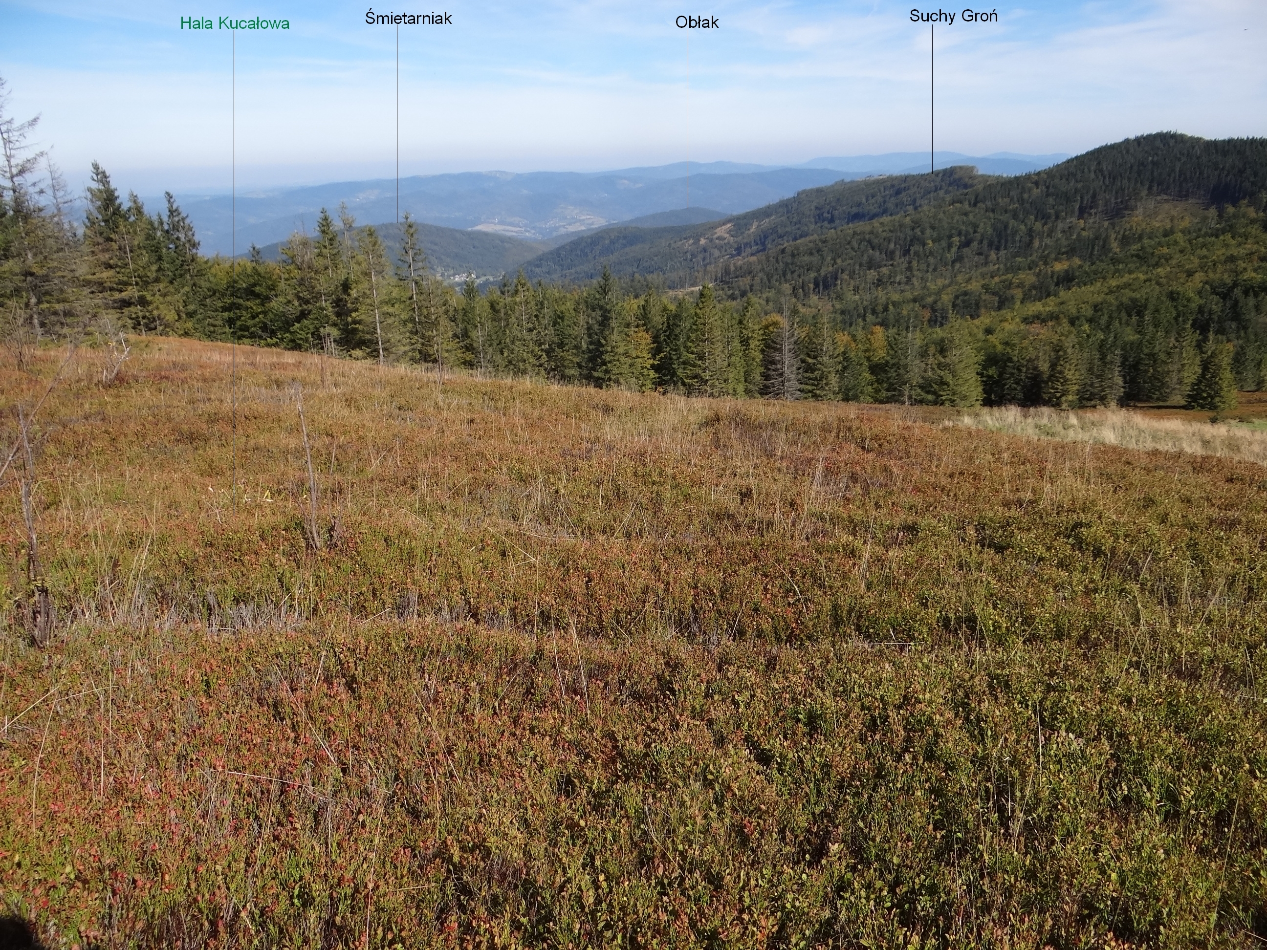 idok z Hali Kucałowej